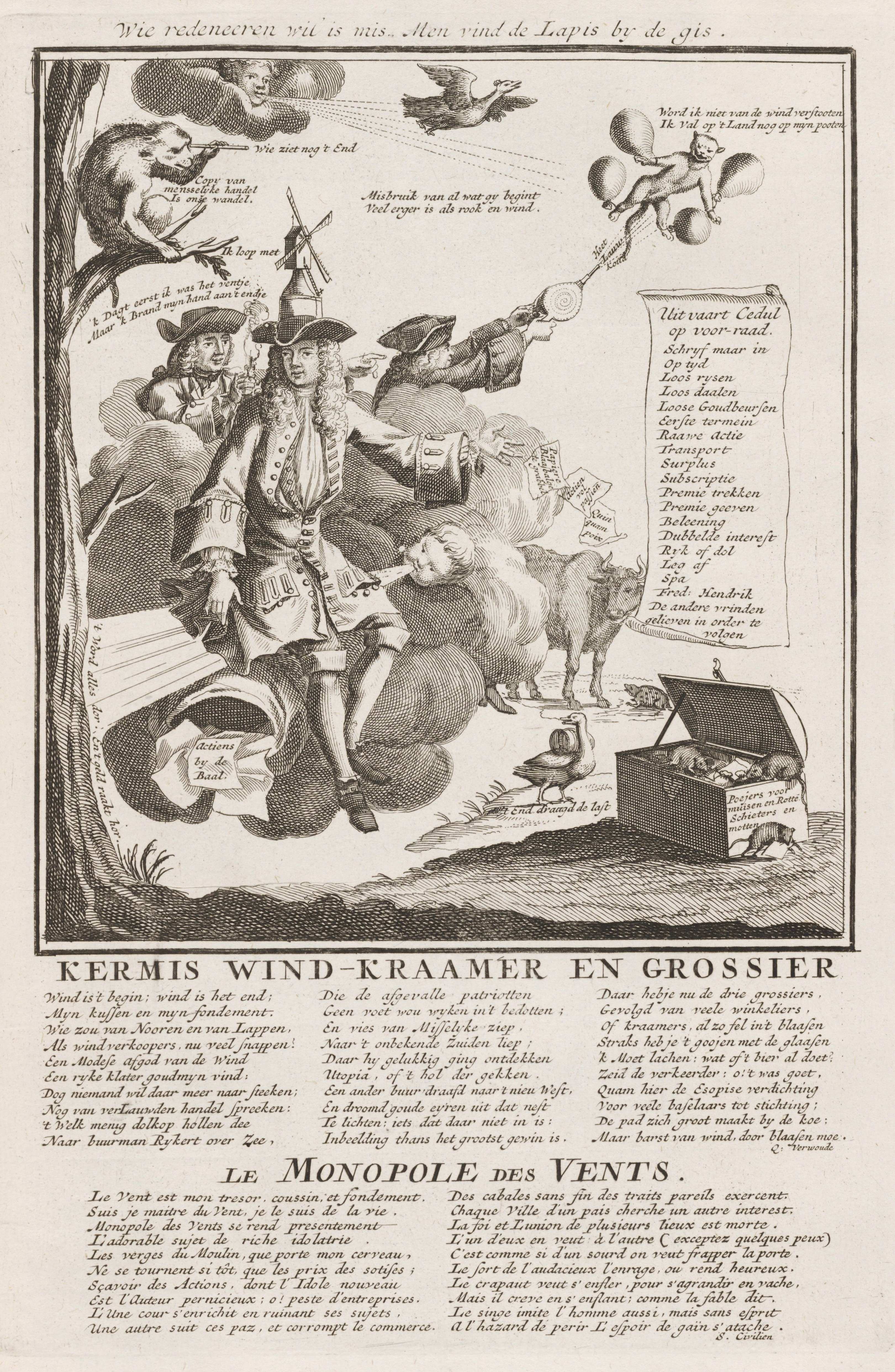 Het Groote Tafereel der Dwaasheid, Wie redeneeren wil is mis, men vind de Lapis by de gis